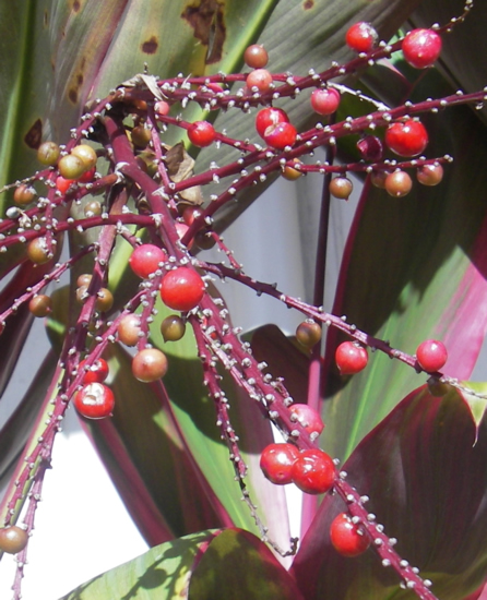 Berries on a ti plant.